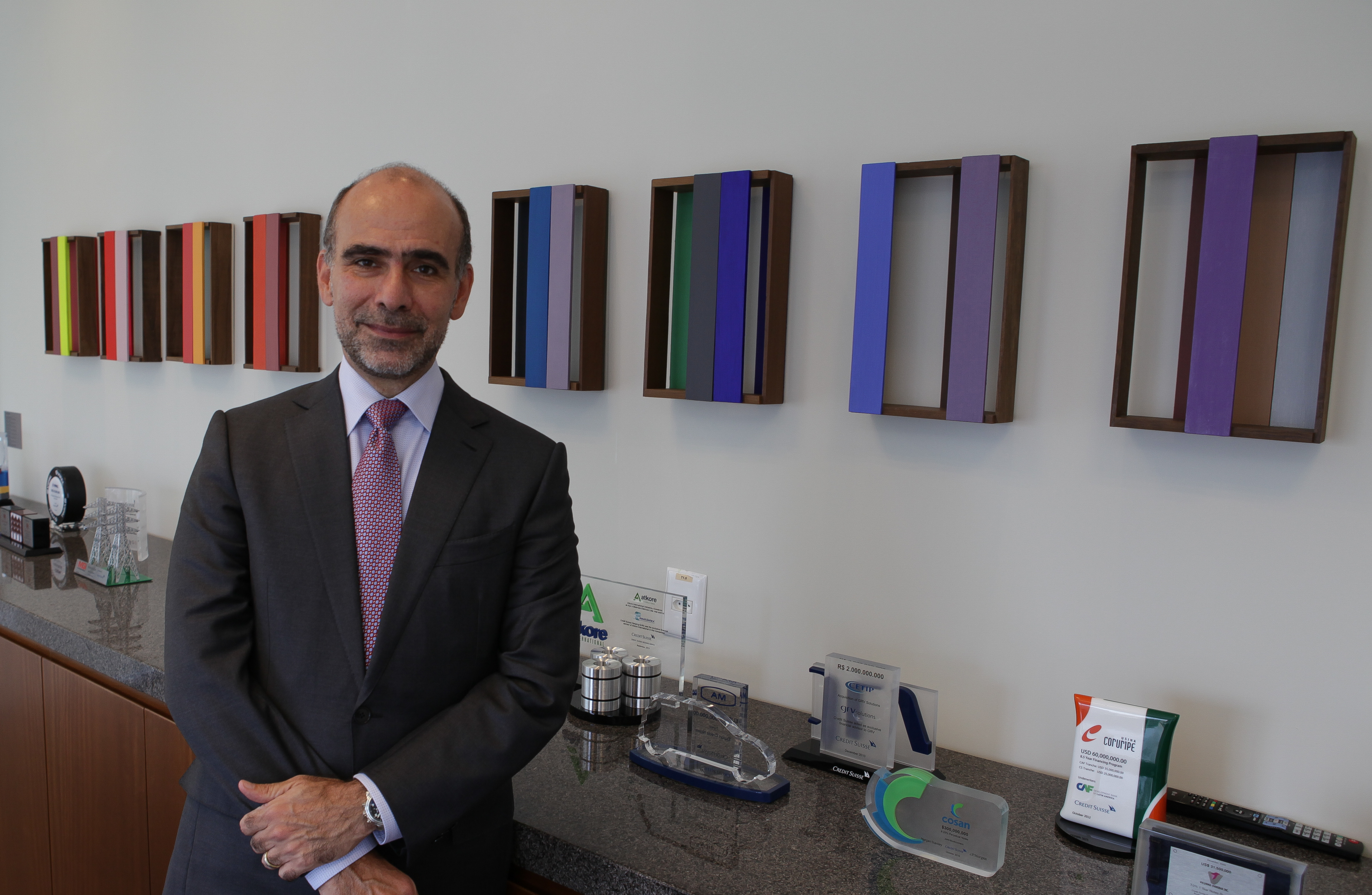 José Olympio Pereira